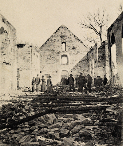 Tittel / Title: Borgund Kirkes Ruiner Motiv / Motif: Postkort. Den store bybrannen i Ålesund fant sted natt til 23. januar 1904. Dato / Date: ca. 1904 Fotograf / Photographer: ukjent Utgiver / Publisher: J. Aarflot Sted / Place: Møre og Romsdal, Ålesund Eier / Owner Institution: Nasjonalbiblioteket / National Library of Norway Lenke / Link: Bildesignatur / Image Number: blds_03783